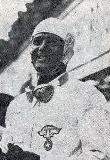 Hermann Paul Müller vainqueur du Grand Prix de l'ACF 1939, sur Auto-Union.